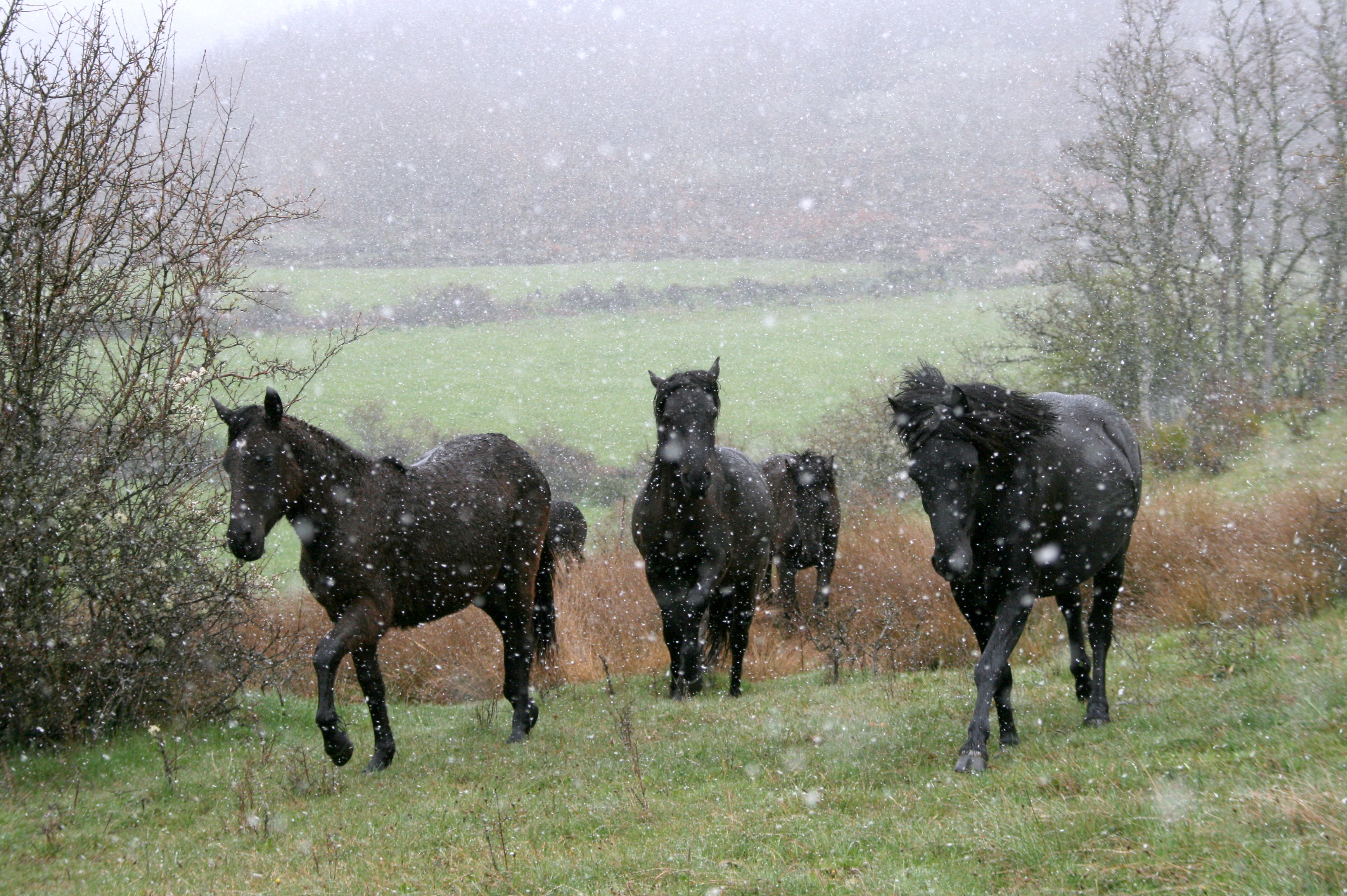 Caballos losinos en Bison Bosanus, Reserva y Centro de Interpretación del Bisonte Europeo de San Cebrián de Mudá (Palencia) This is a photography of a Special Area of Conservation in Spain with the ID: ES4140011. Natura2000 entry, EEA entry